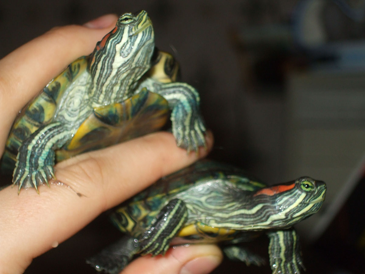 2 Pseudemys scripta